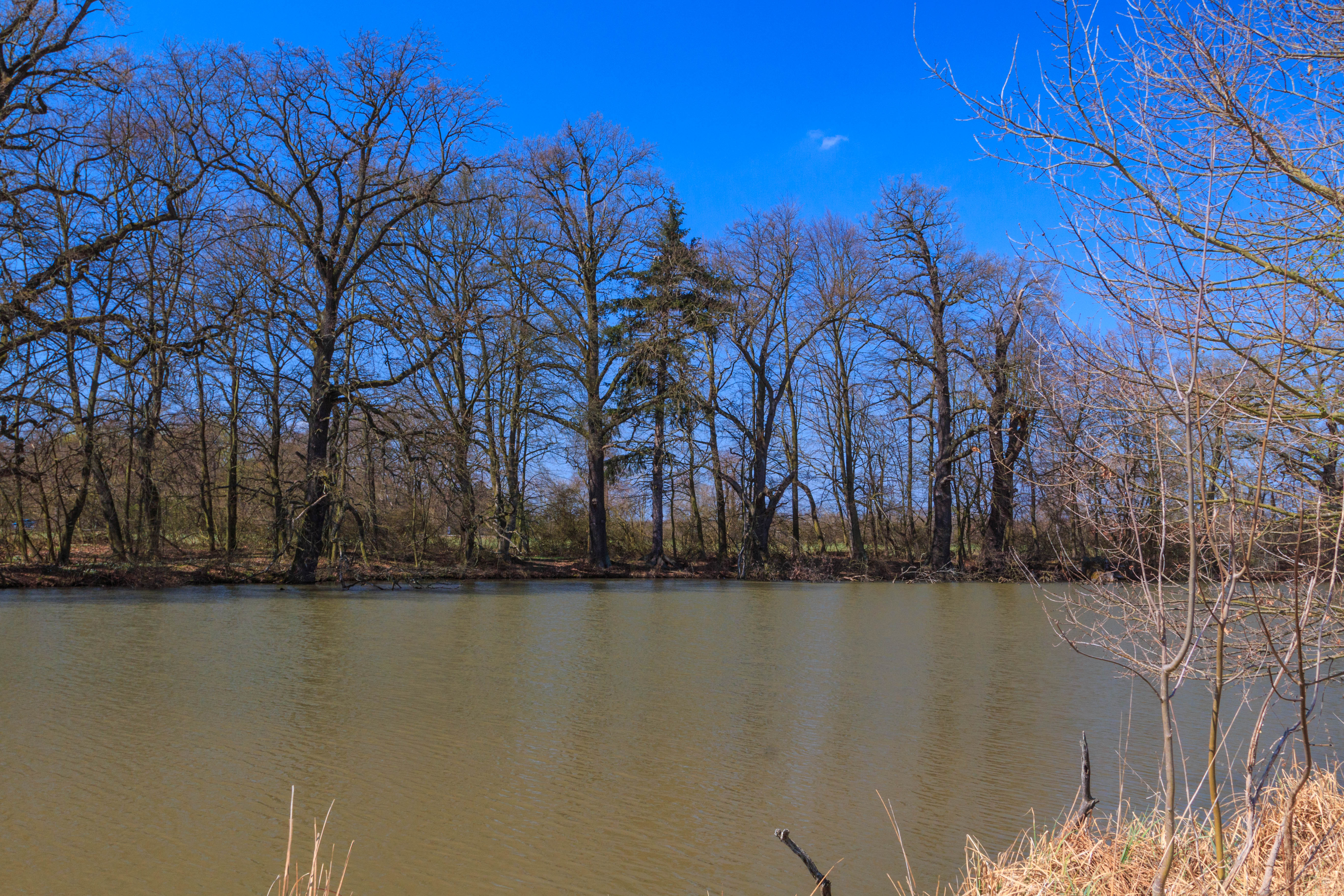 Staré rameno Labe u dvora Josefov u Kladrub nad Labem Project: Vodstvo.